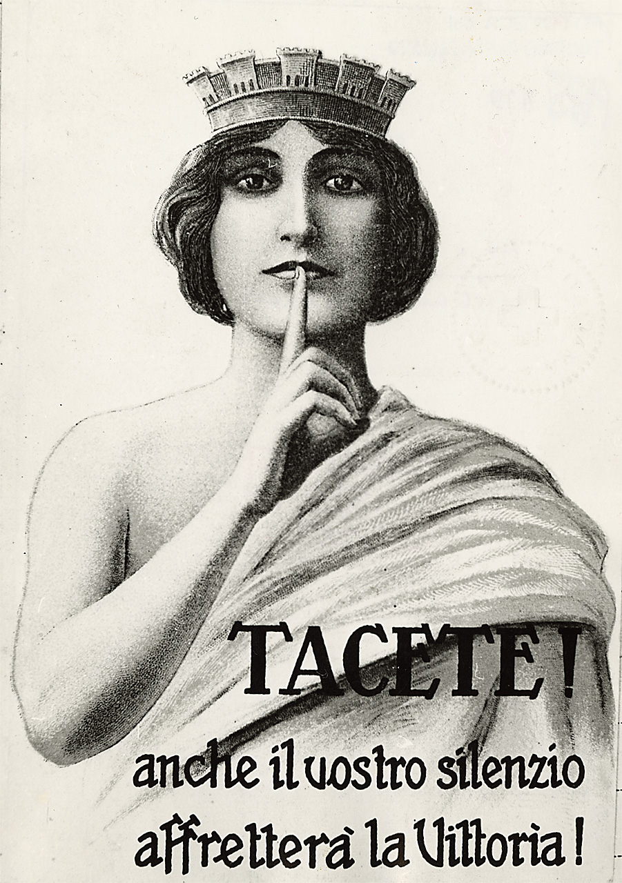 Affiche diffusée en Italie pendant la Première Guerre mondiale montrant une femme exigeant (Tacete !) même votre silence (anche il vostro silenzio), ce qui hâtera la victoire (affretterà la Vittoria).